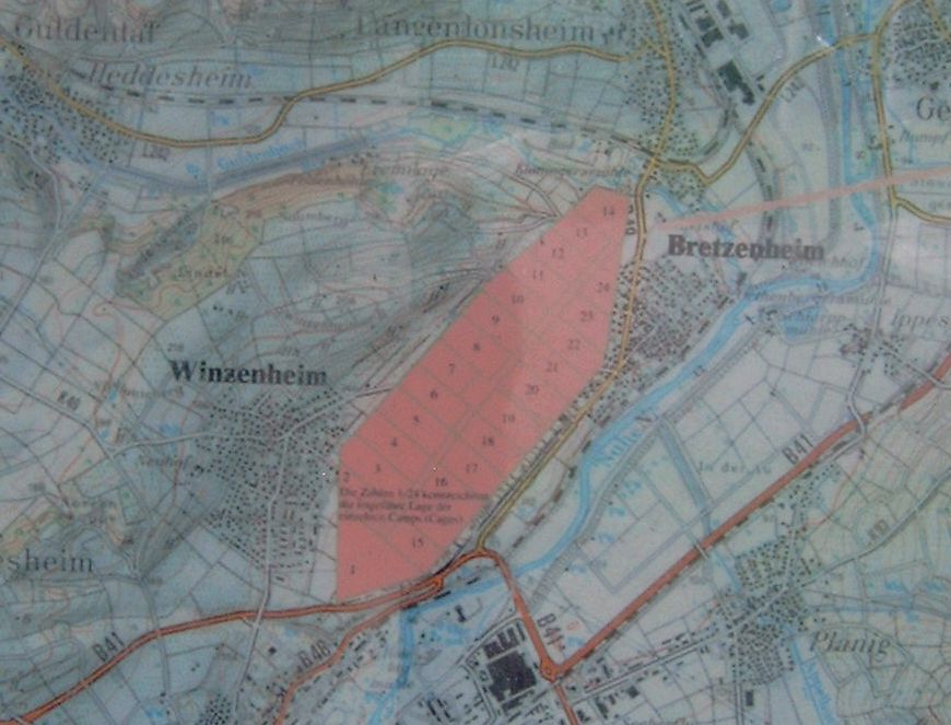 Lagekarte des Kriegsgefangenenlagers Feld des Jammers